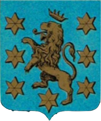 Blasone della famiglia Notarbartolo